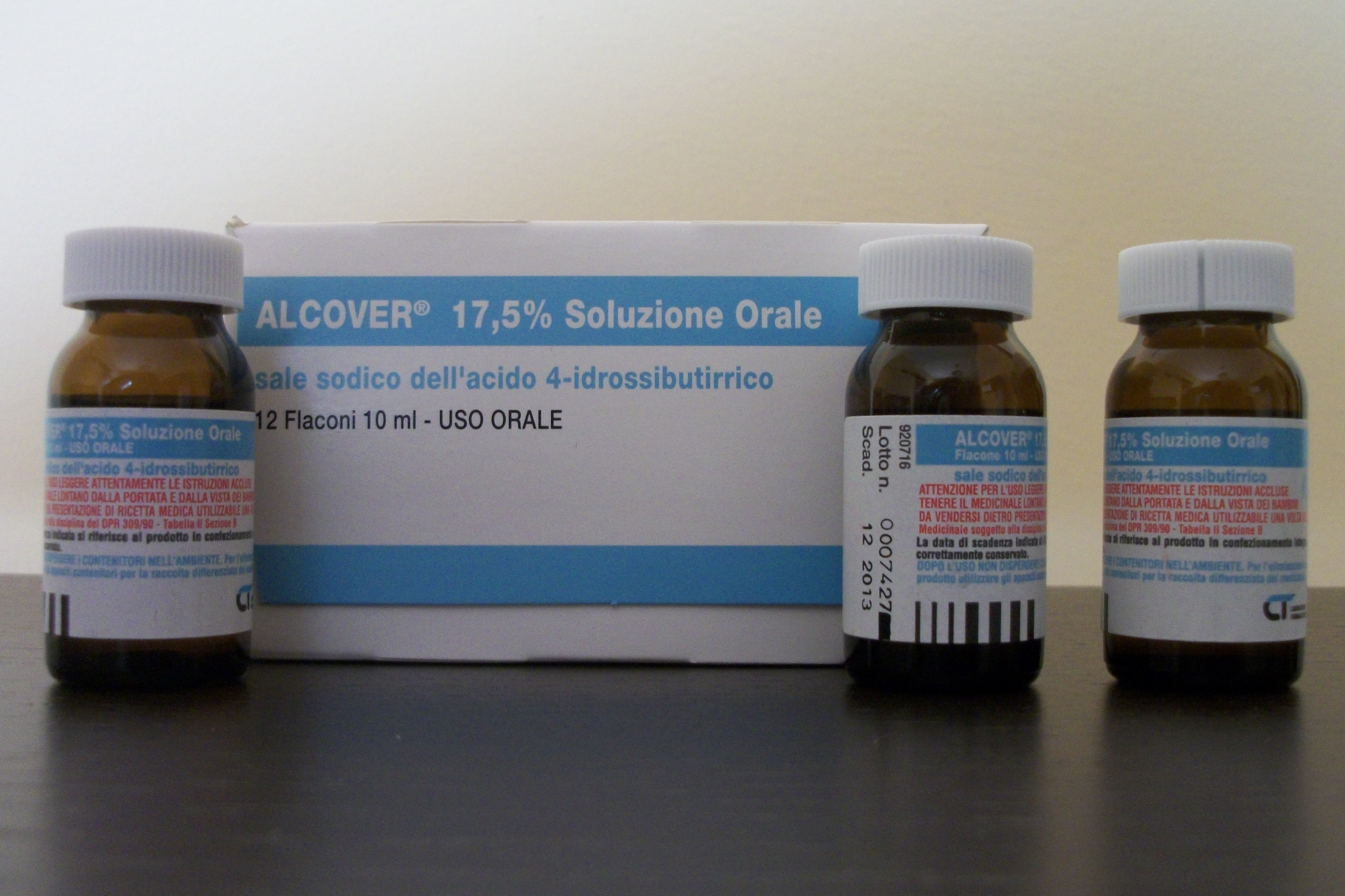 Acido Gamma idrossibutirrico commercializzato con il nome di Alcover